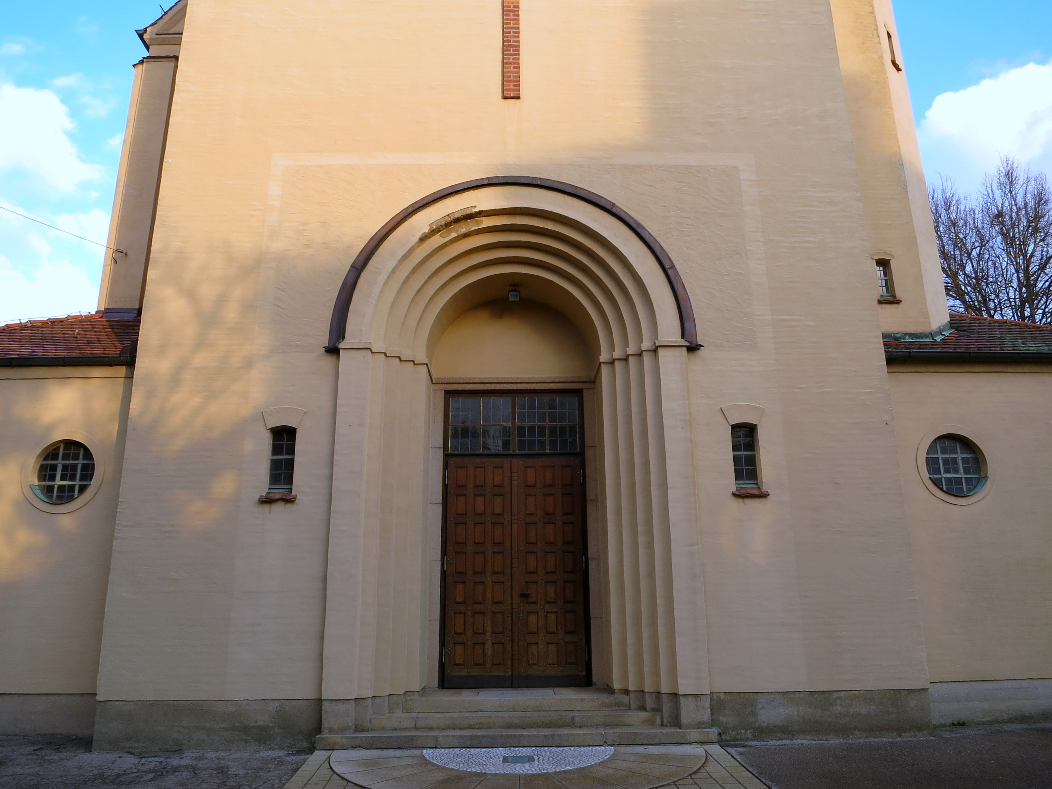 Kirche im Februar 2018